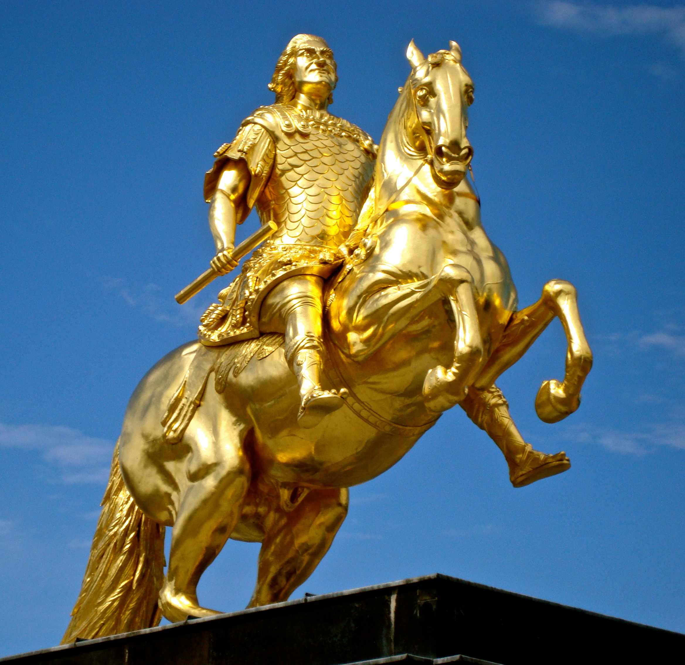 Das Reiterstandbild wurde zwischen 1732 und 1734 von Ludwig Wiedemann geschaffen. Es ist aus Kupfer getrieben und feuervergoldet. Es zeigt August den Starken als römischen Caesar mit Rüstung. Es steht in Dresden auf dem Neustädter Markt. August der Starke wurde am 12. Mai 1670 als Friedrich August I als zweitältester Spross des Wettiner Geschlechts geboren. Er bestieg mit 24 Jahren nach dem Tod seines Bruders den kursächsichen Thron. Am 15.09.1697 wurde er als August II zum polnischen König gekrönt. Er starb am 01.02.1733 in Warschau.